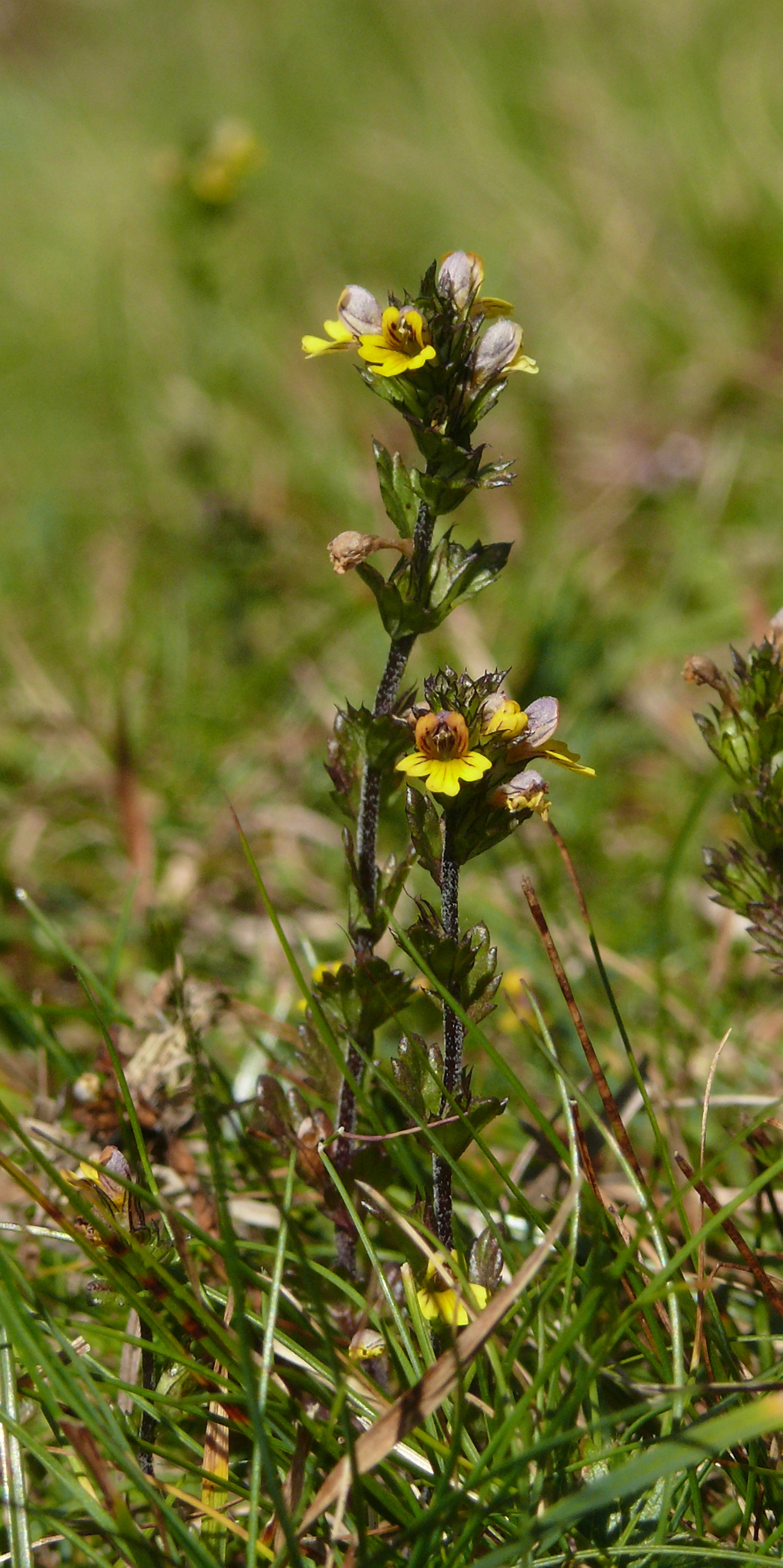 Euphrasia minima, Zillertaler Alpen, Italien